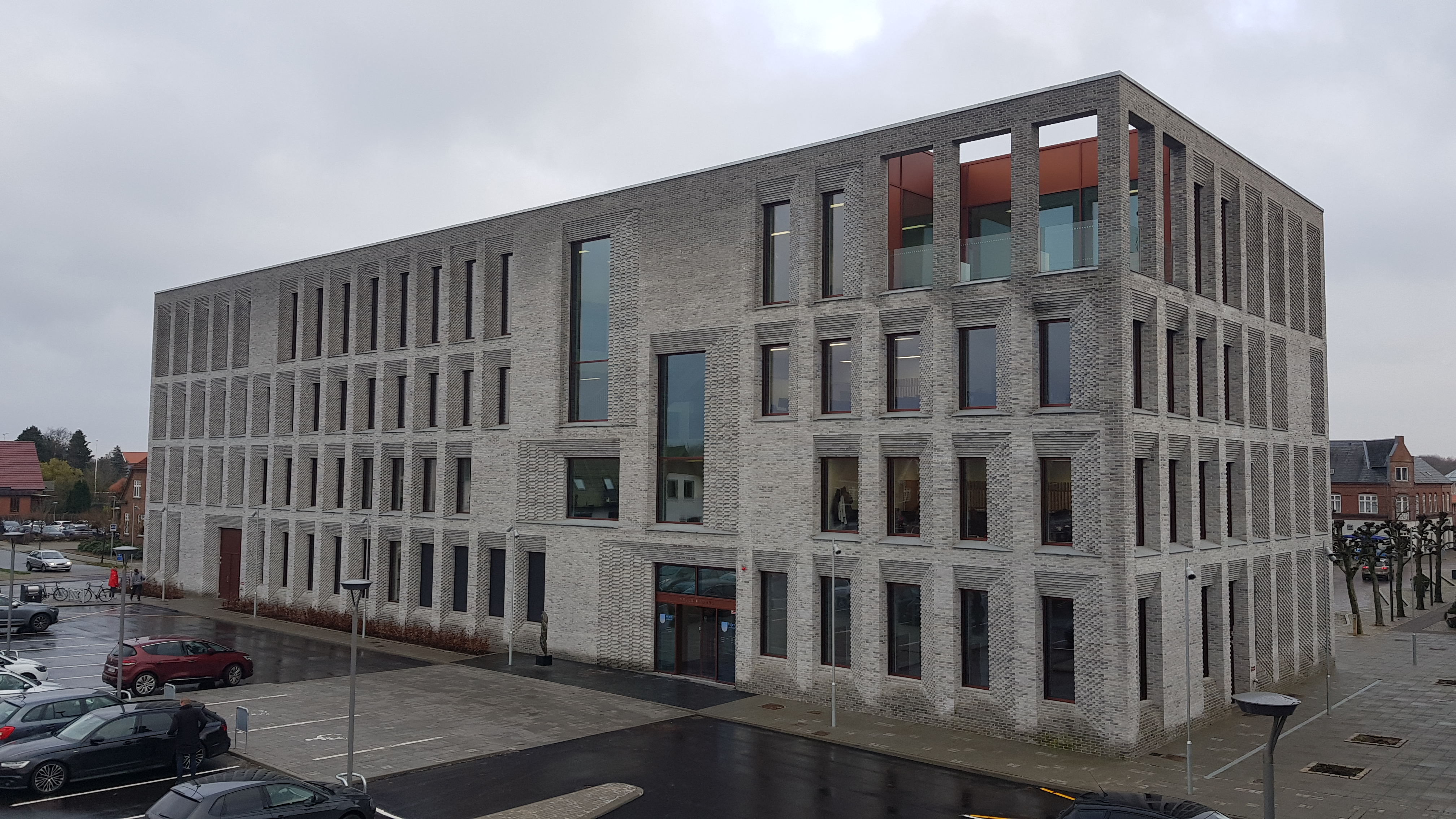 Vejen Kommunes nye rådhus set fra Kvicklys tagparkering